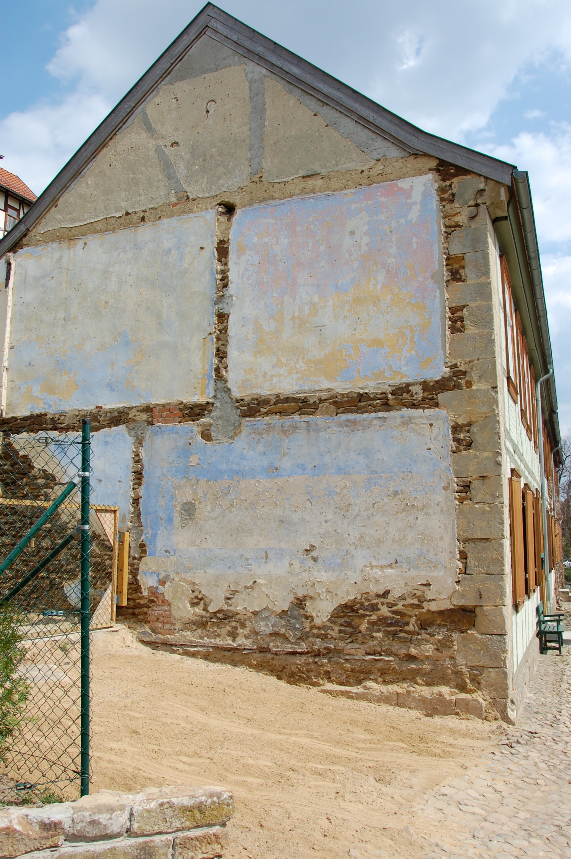 Standort des ehemaligen Hauses Langenbergstraße 3 in Quedlinburg